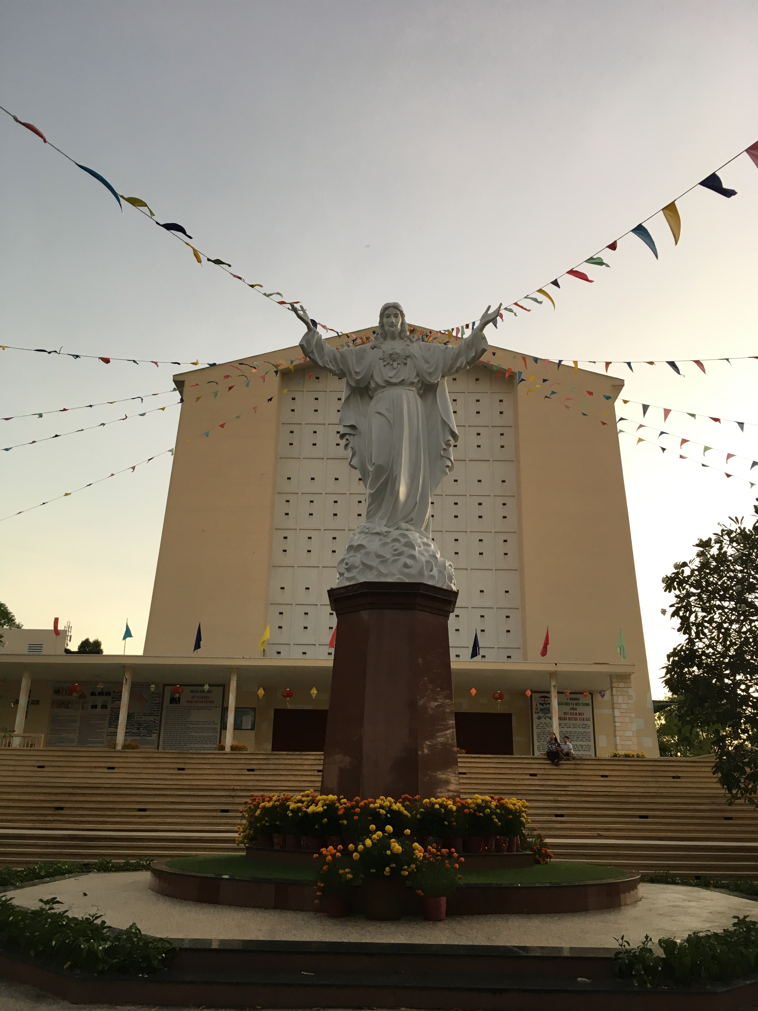 Nhà thờ Chính toà Vĩnh Long sau khi cải tạo và dựng tượng Chúa mới